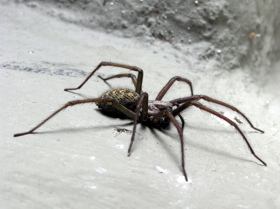 Tegenaria atrica - Weibchen, aufgenommen in einem Dresdner Hauskeller